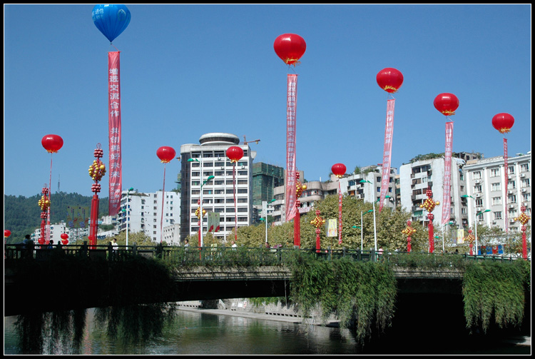 Honghuagang, Zunyi, Guizhou, China